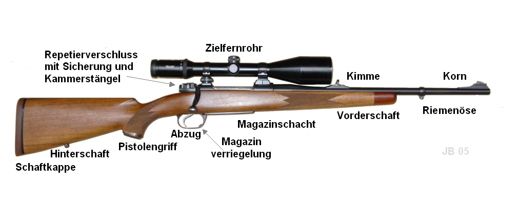 Repetiergewehr mit Bezeichnung der Teile Grafik Joachim Bäcker 2005/09/27